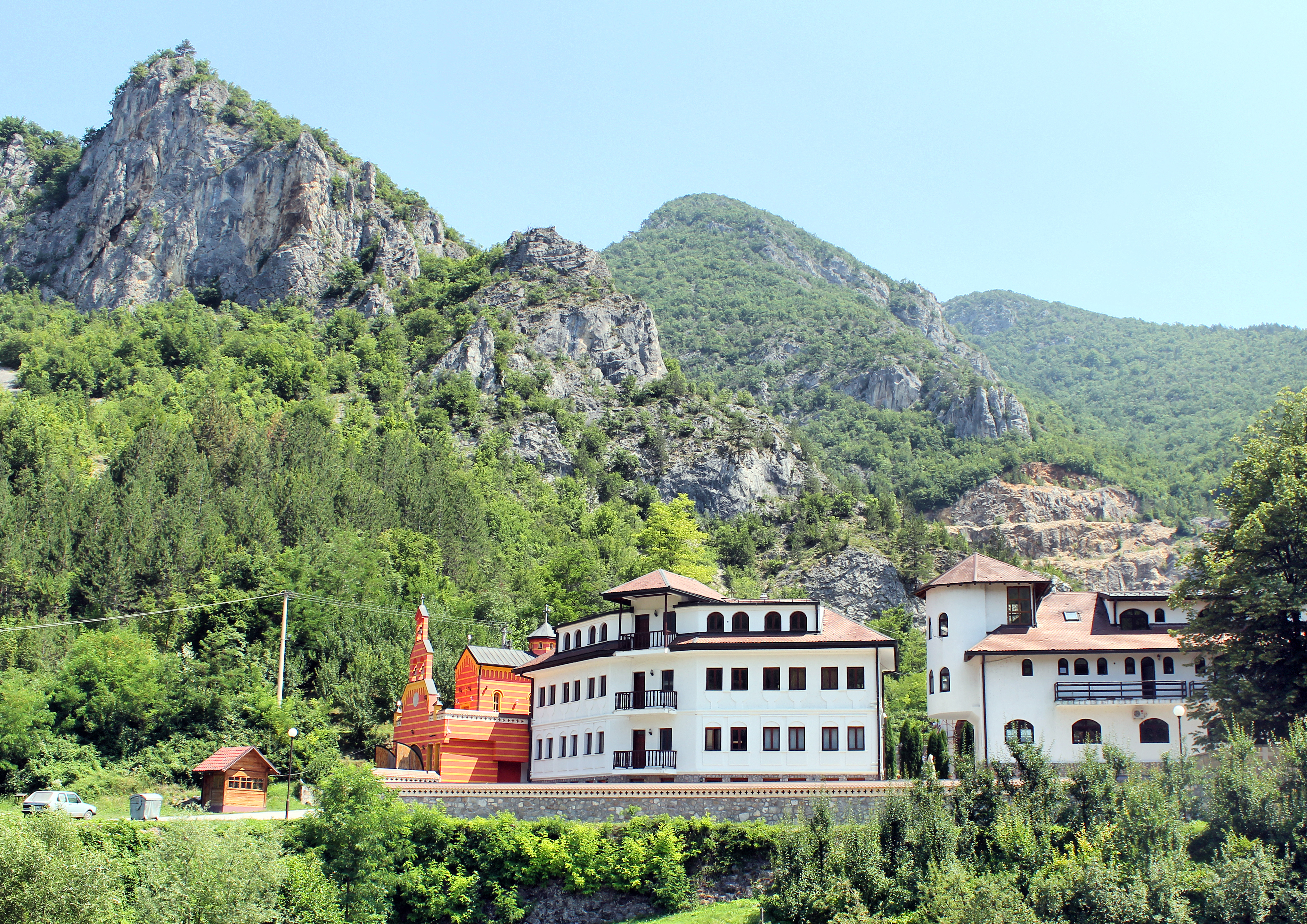 Gornji Dobrun, Bosnia and Herzegovina